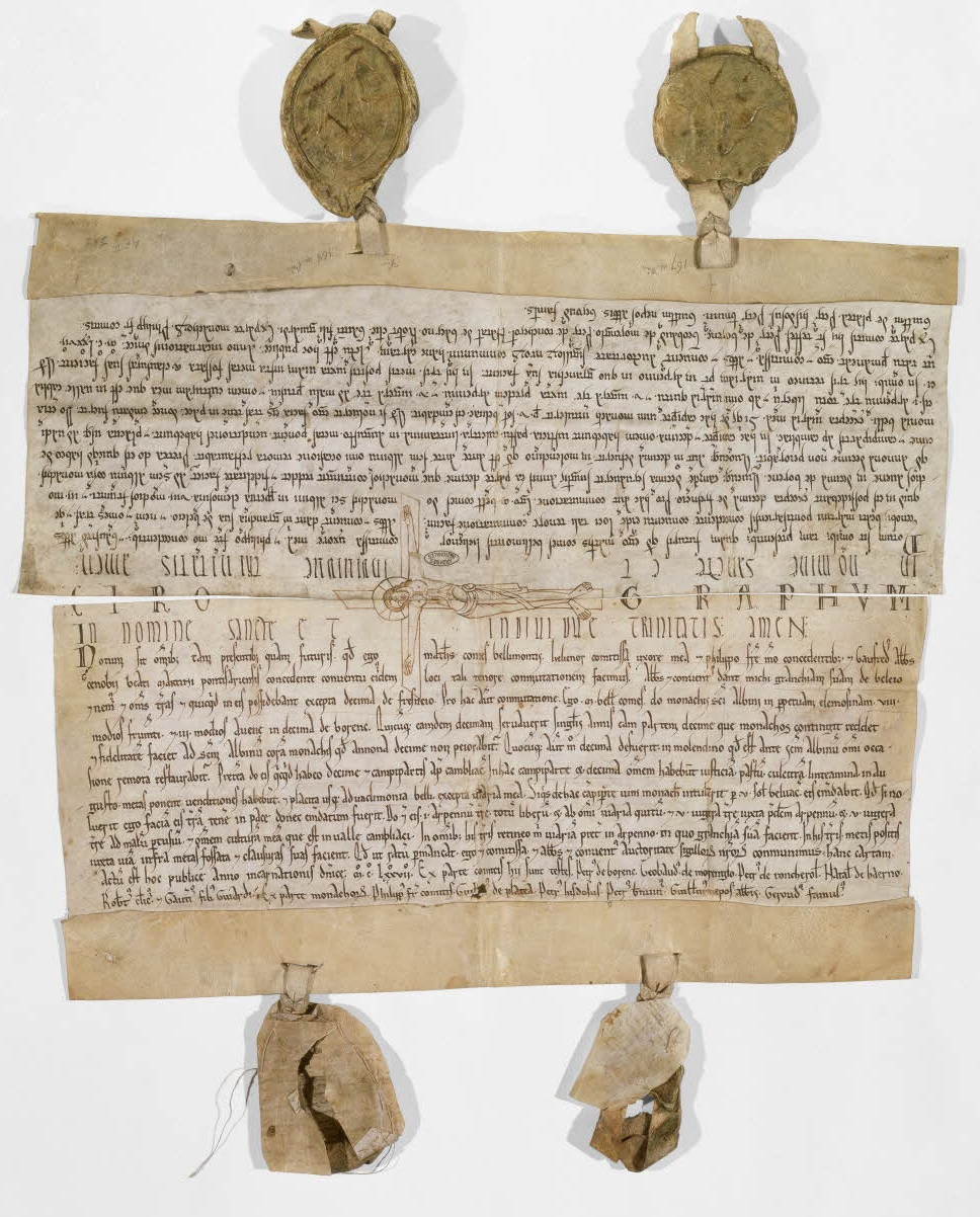 Charte sous forme de chirographe de Matthieu III, comte de Beaumont-sur-Oise, agissant en accord avec son frère Philippe et son épouse Éléonore de Vermandois, et de l’abbé de Saint-Martin de Pontoise par lequel ils attestent avoir échangé des terres à Chambly et Boran-sur-Oise. La partie supérieure est conservée aux Archives nationales et la partie inférieure aux Archives départementales du Val-d'Oise. Chacune est scellée des sceaux du comte et de l'abbé, aux revers desquels la comtesse et l'abbaye ont contre-scellé.